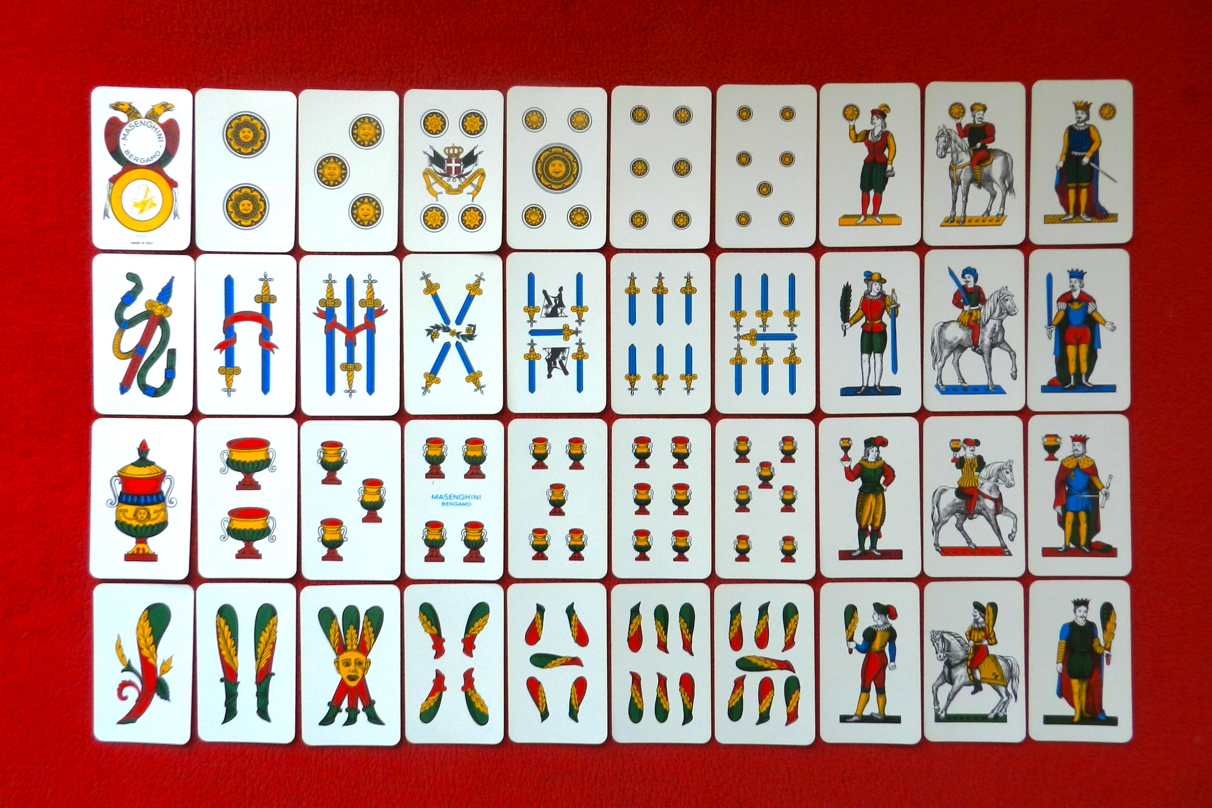 Cartes italiennes du jeu de la scopa